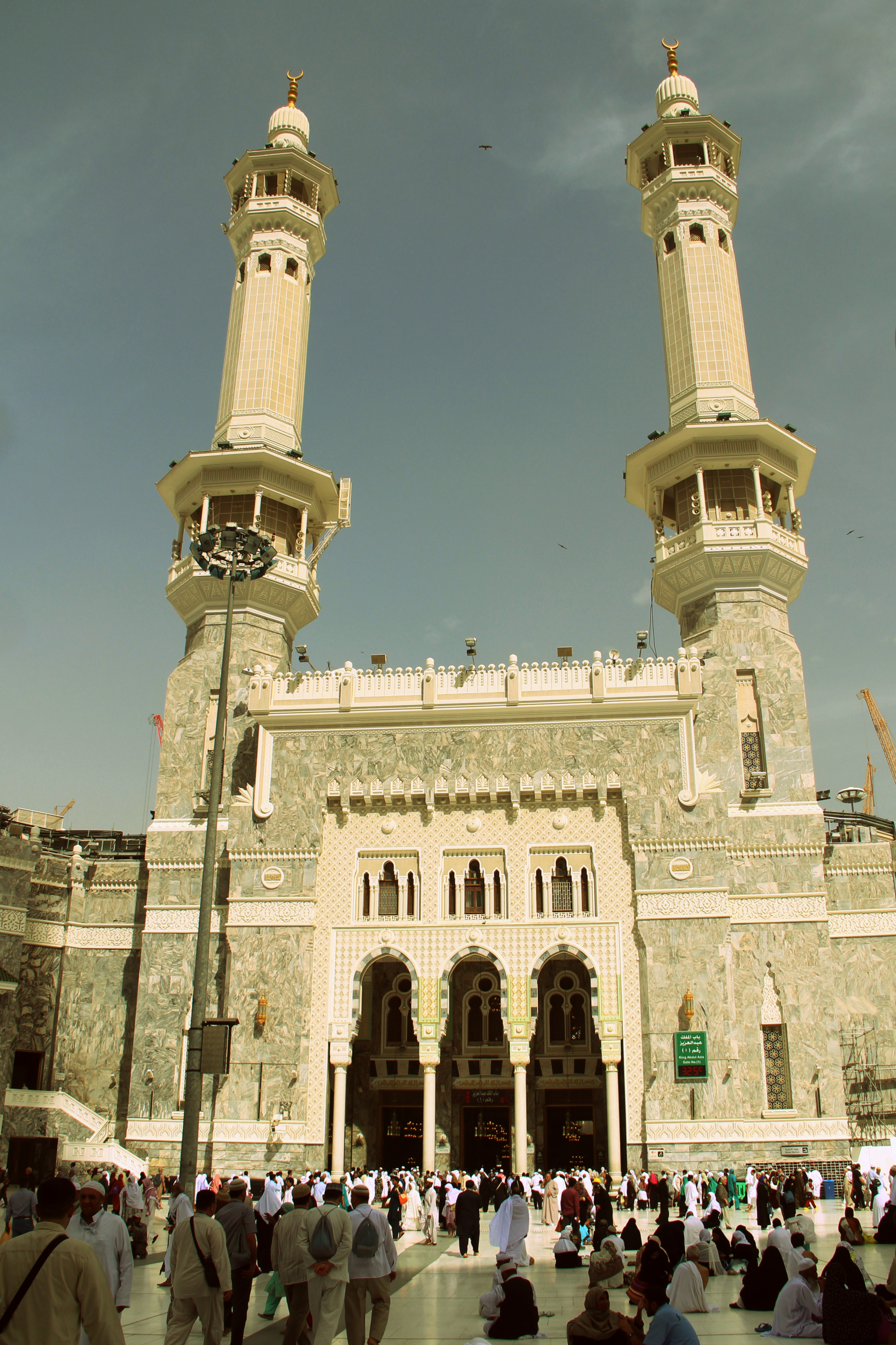 Al Masjid Al Haram